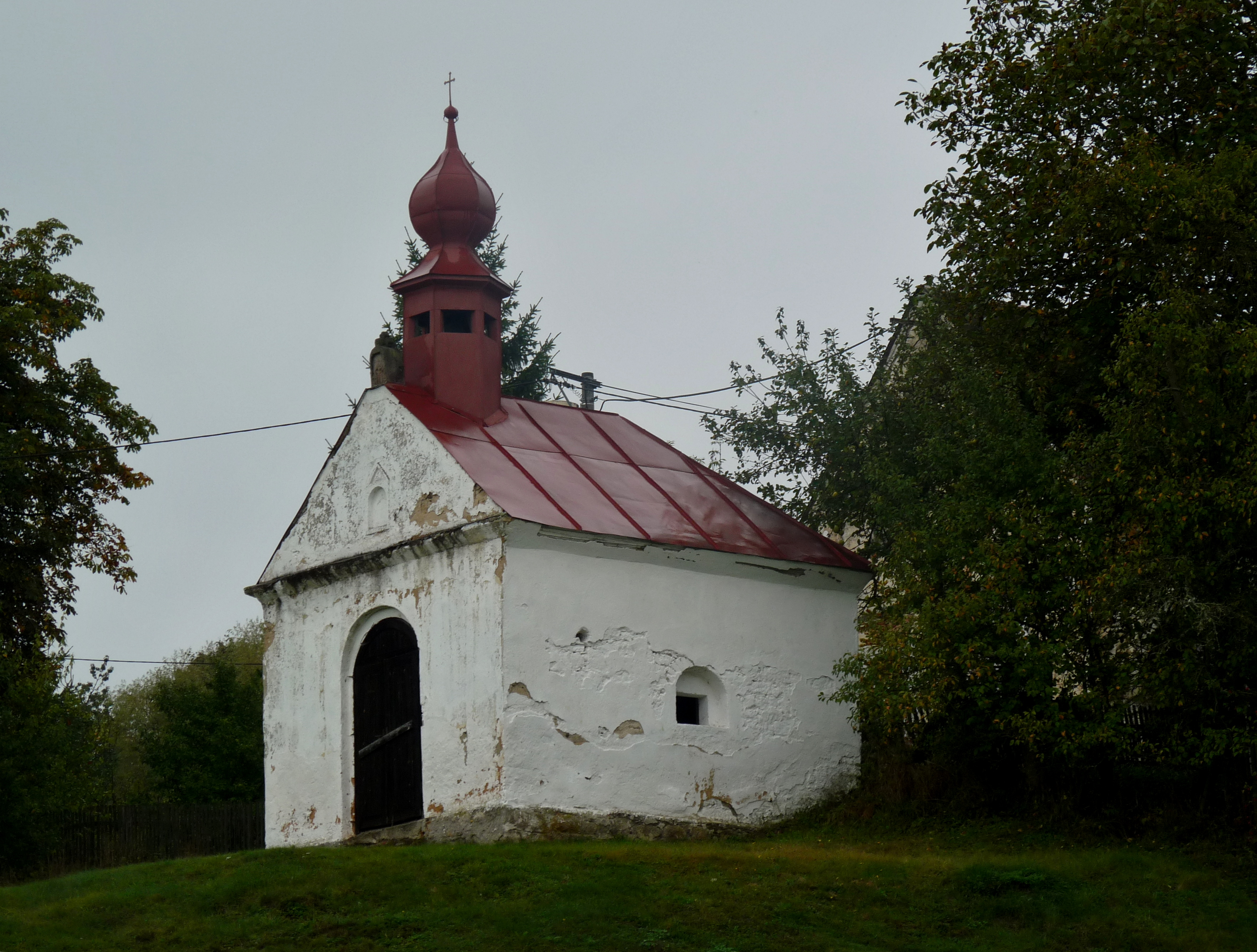 Kaplička, náves, Kejšovice.